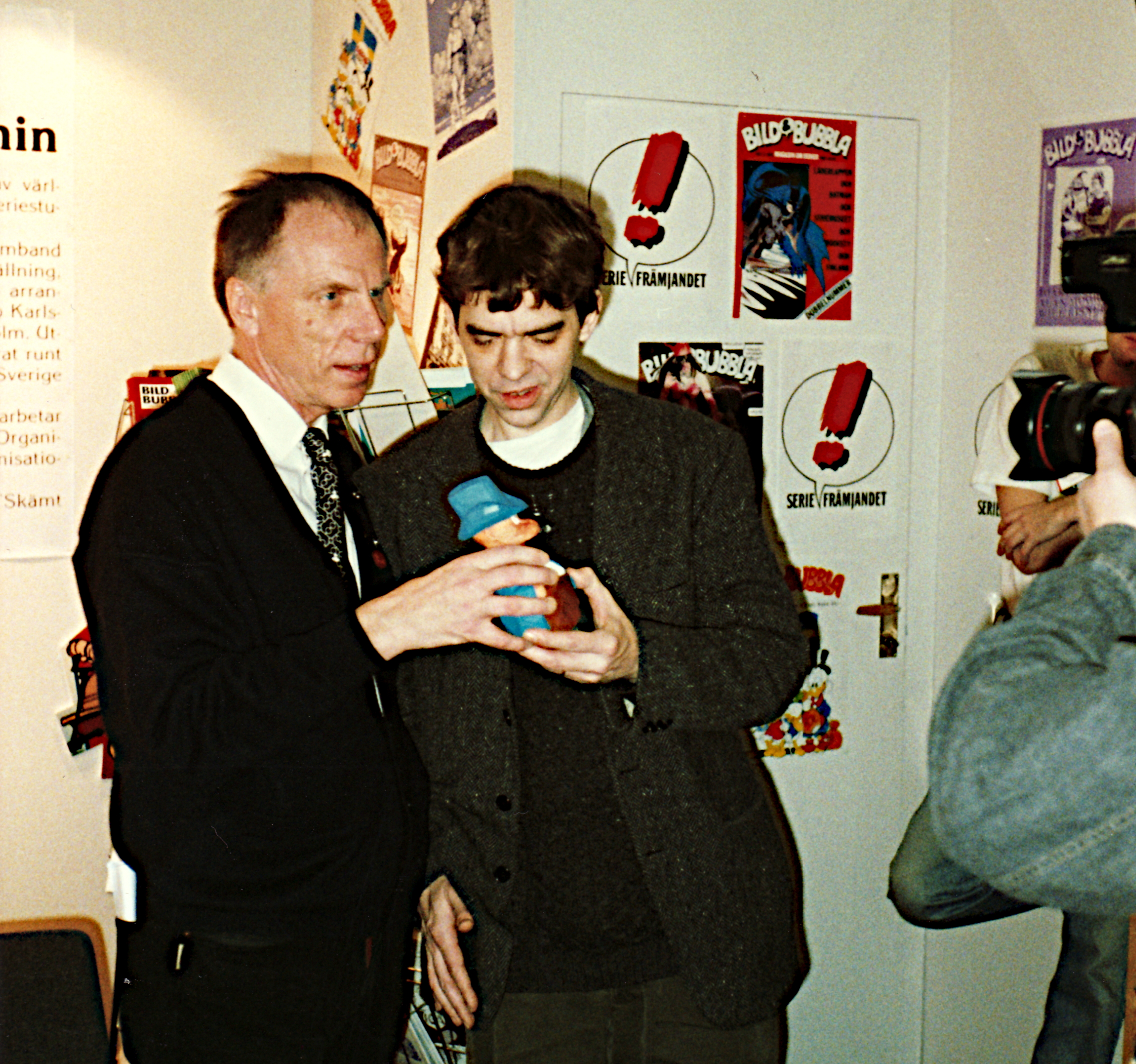 Sture Hegerfors och Gunnar Lundkvist, oktober 1994. Detta är vid utdelningen av den svenska Adamsonstatyetten, i Svenska Serieakademins monter på Bok & Bibliotek-mässan i Göteborg.